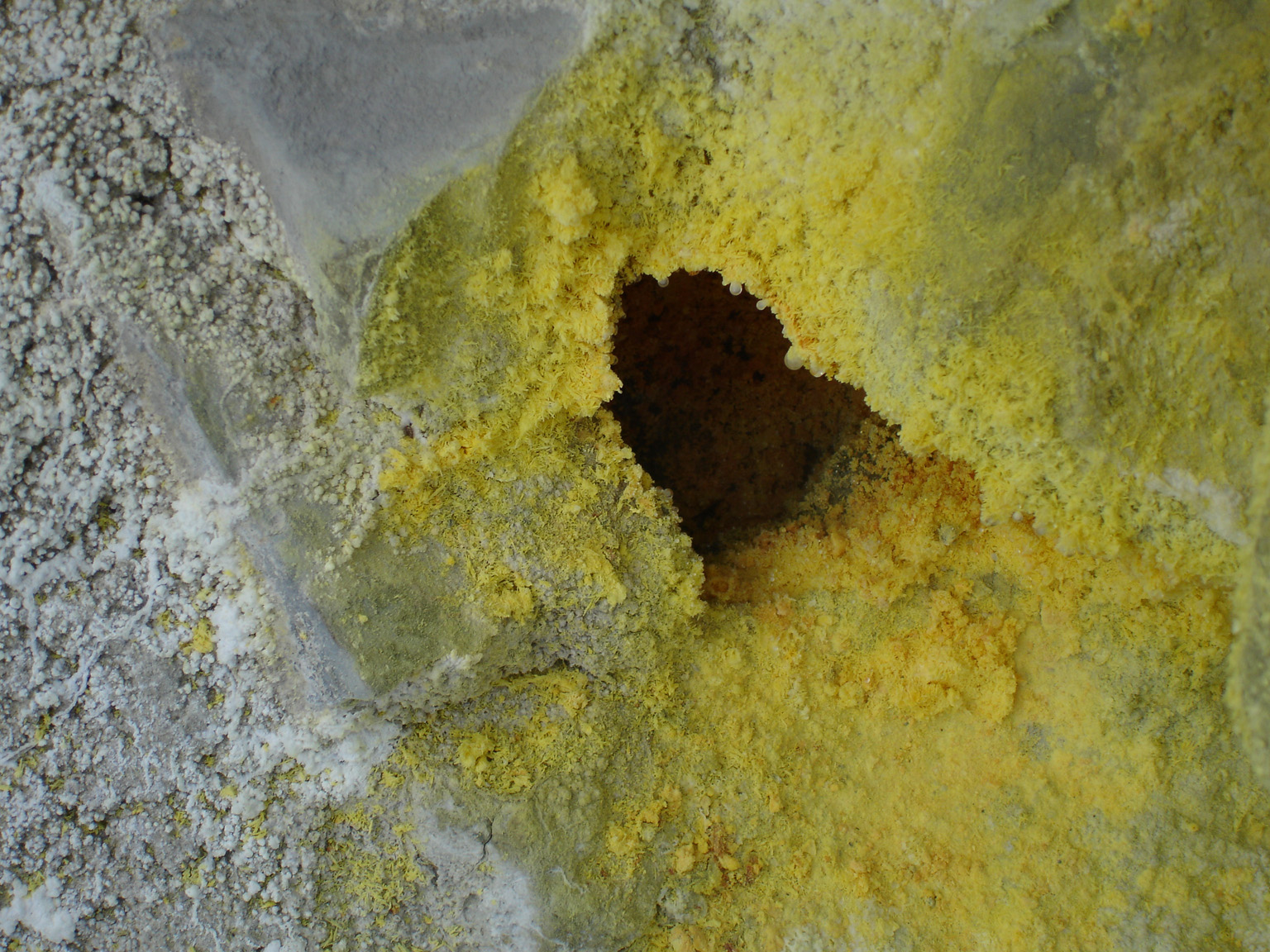 Vulcano, Sicily